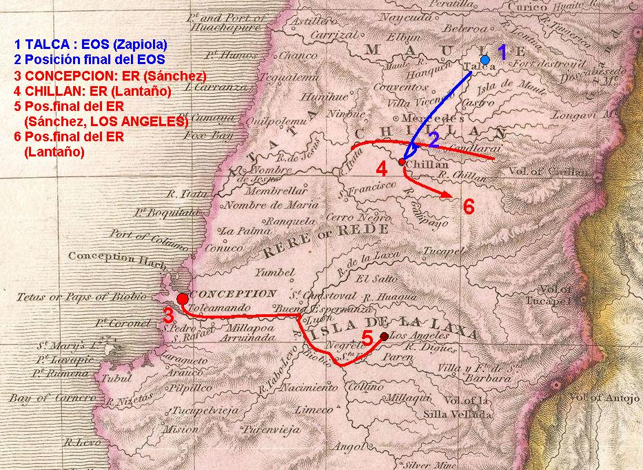 Segunda Campaña del Sur de Chile (ofensiva Zapiola)